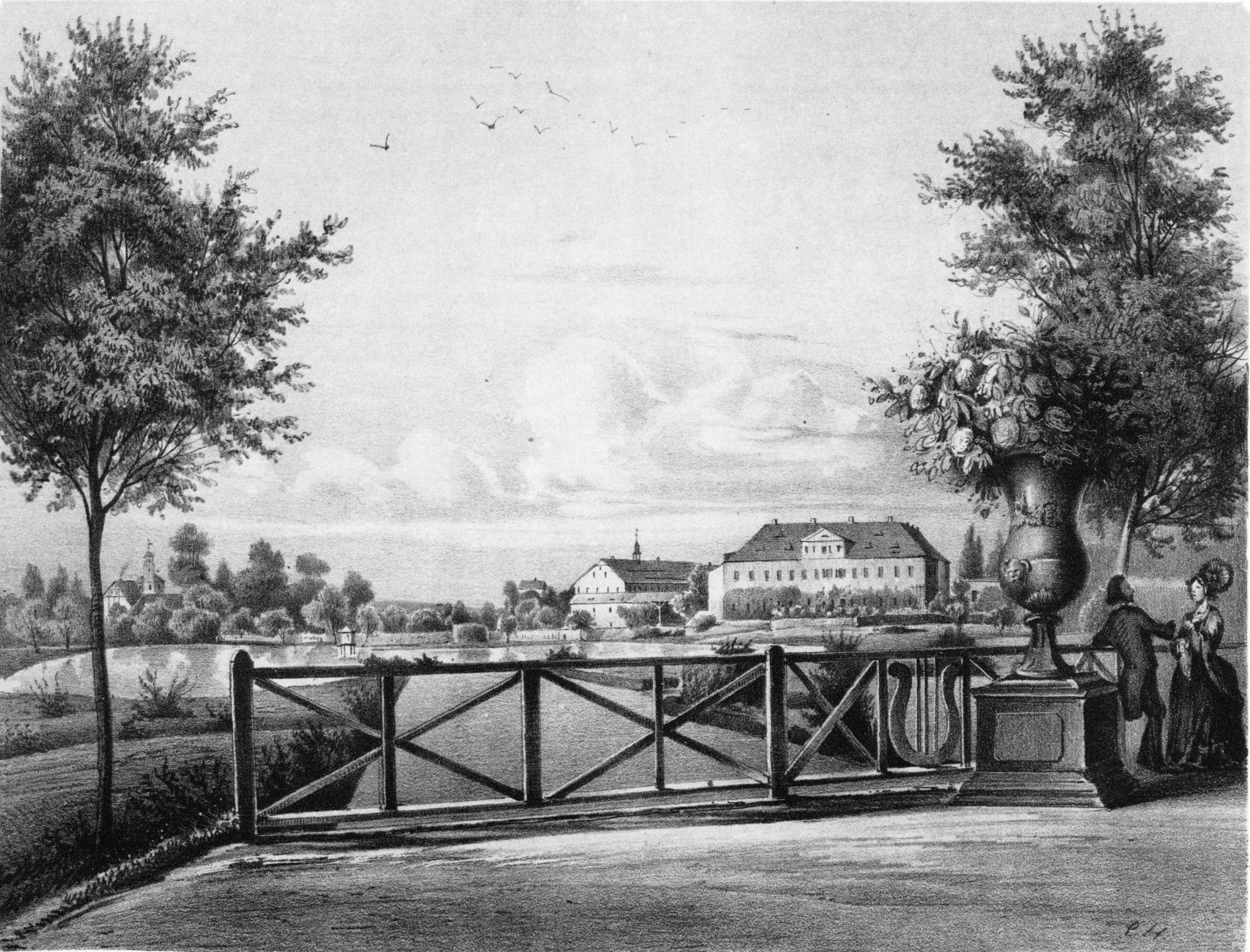 Das Rittergut Bischheim Mitte des 19. Jahrhunderts